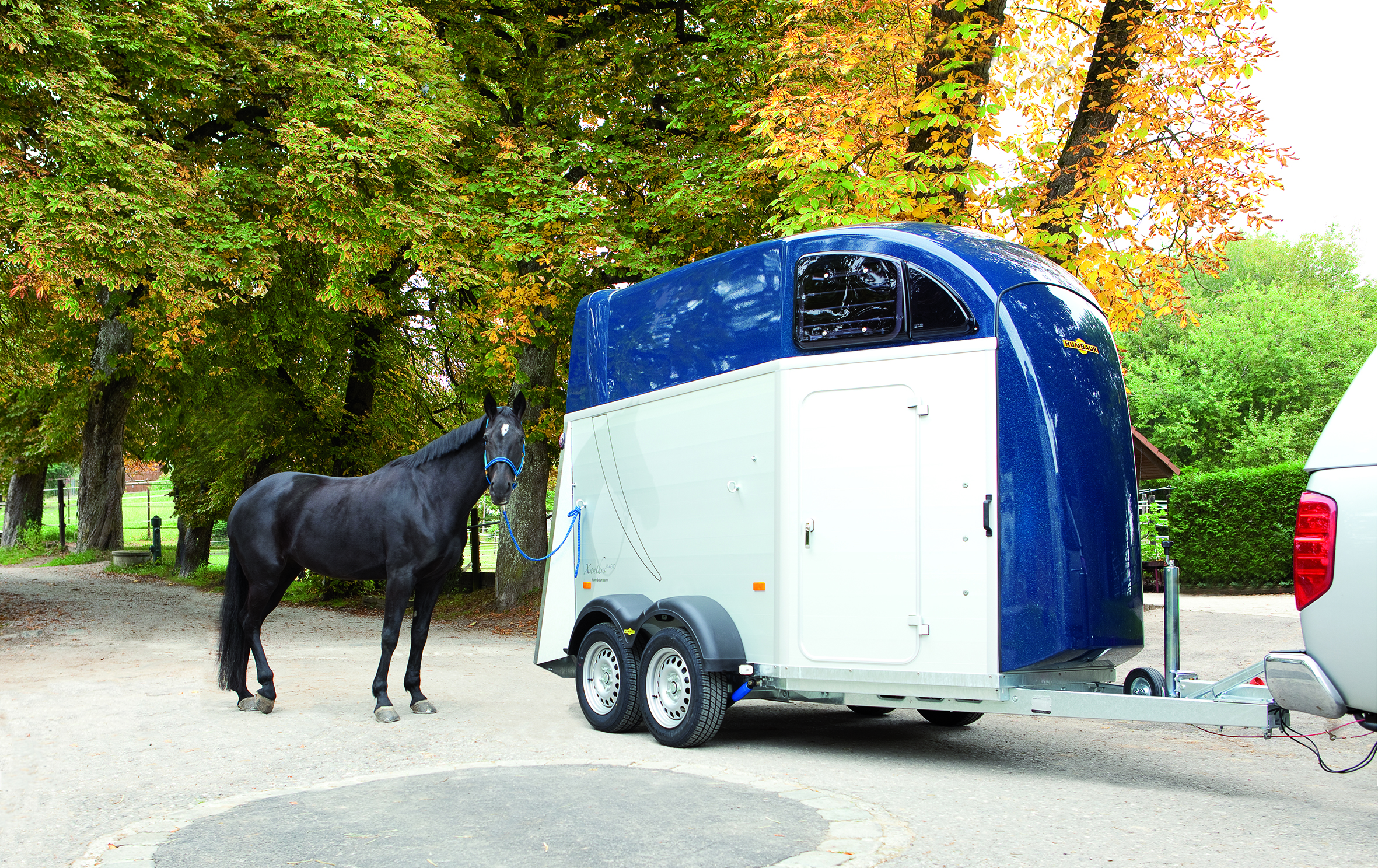 Humbaur Serie7000 Xanthos AERO